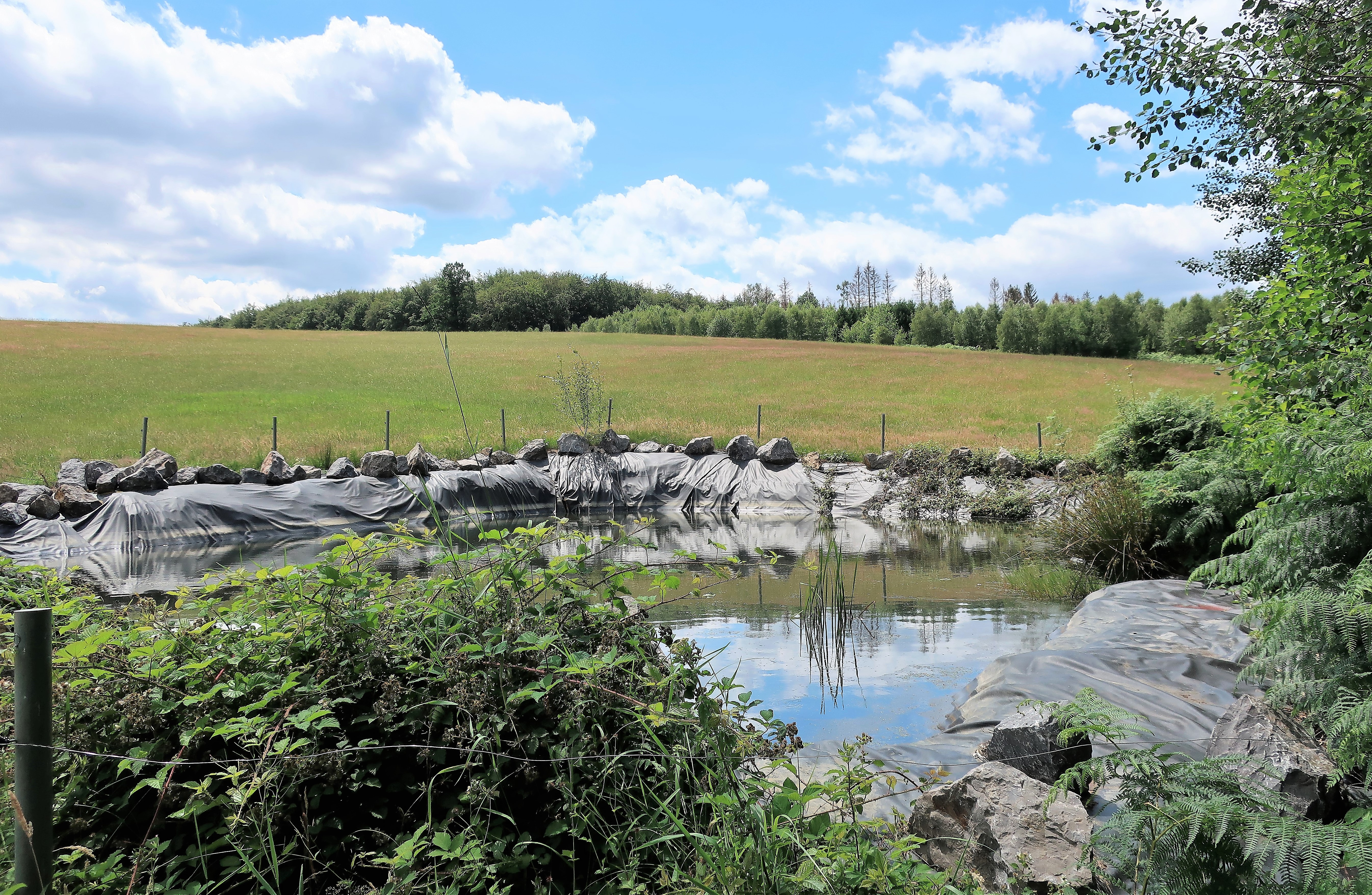 Geschützter Landschaftsbestandteil 1.4.2.30 „Quellgewässer Schälk“ in Hagen, am Waldrand westlich von Schälk. Es handelt sich um einen Quelltümpel mit Schwimmblatt-Pflanzengesellschaften und einer Röhrichtzone.